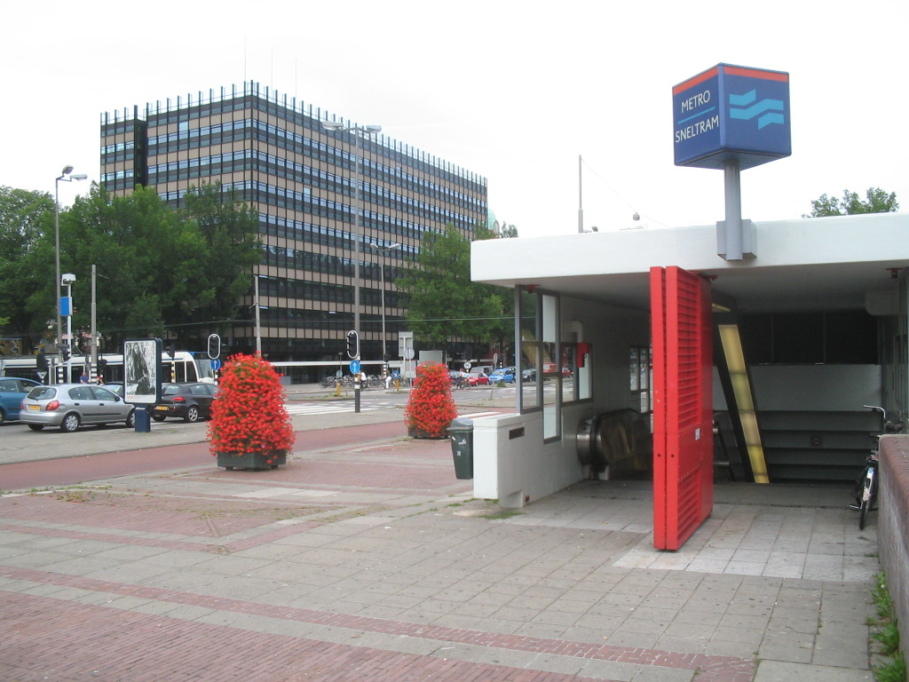 metrostation ingang Weesperplein (Mauritskade)